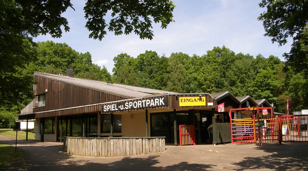 Der Wingster Sport und Freizeitpart im Frühling